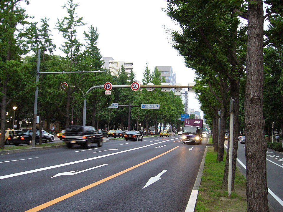 靱公園を南北に貫くja:なにわ筋